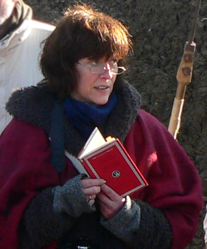 Karola Hagemann liest einen historischen lateinischen Text bei einer Führung auf dem römisches Marschlager Wilkenburg